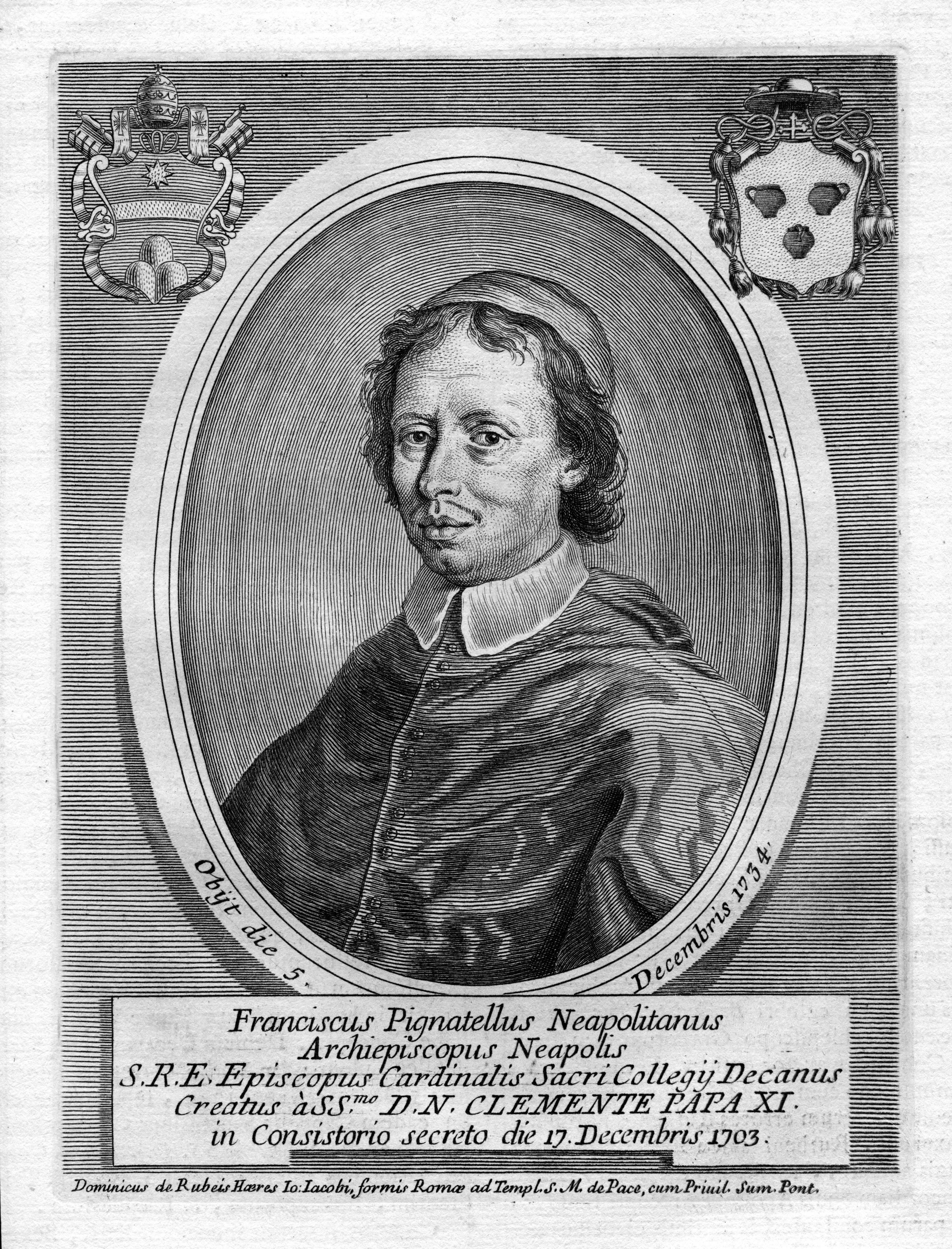 Il cardinale Francesco Pignatelli